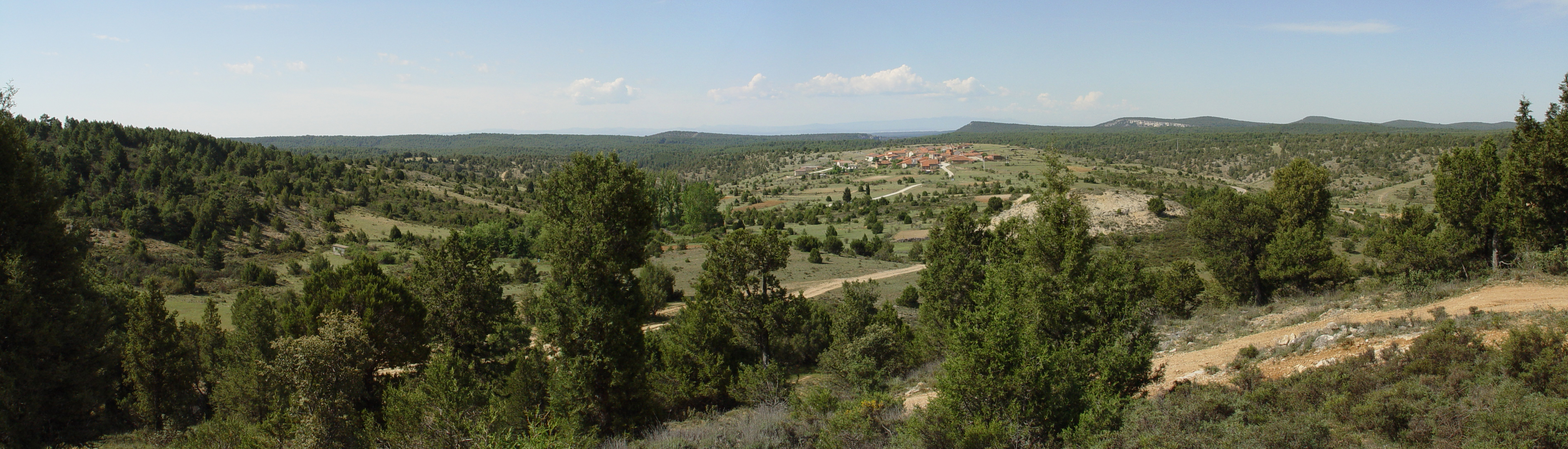 Vista panorámica del municipio de Herrera de Soria desde el paraje denominado "Revoluga"